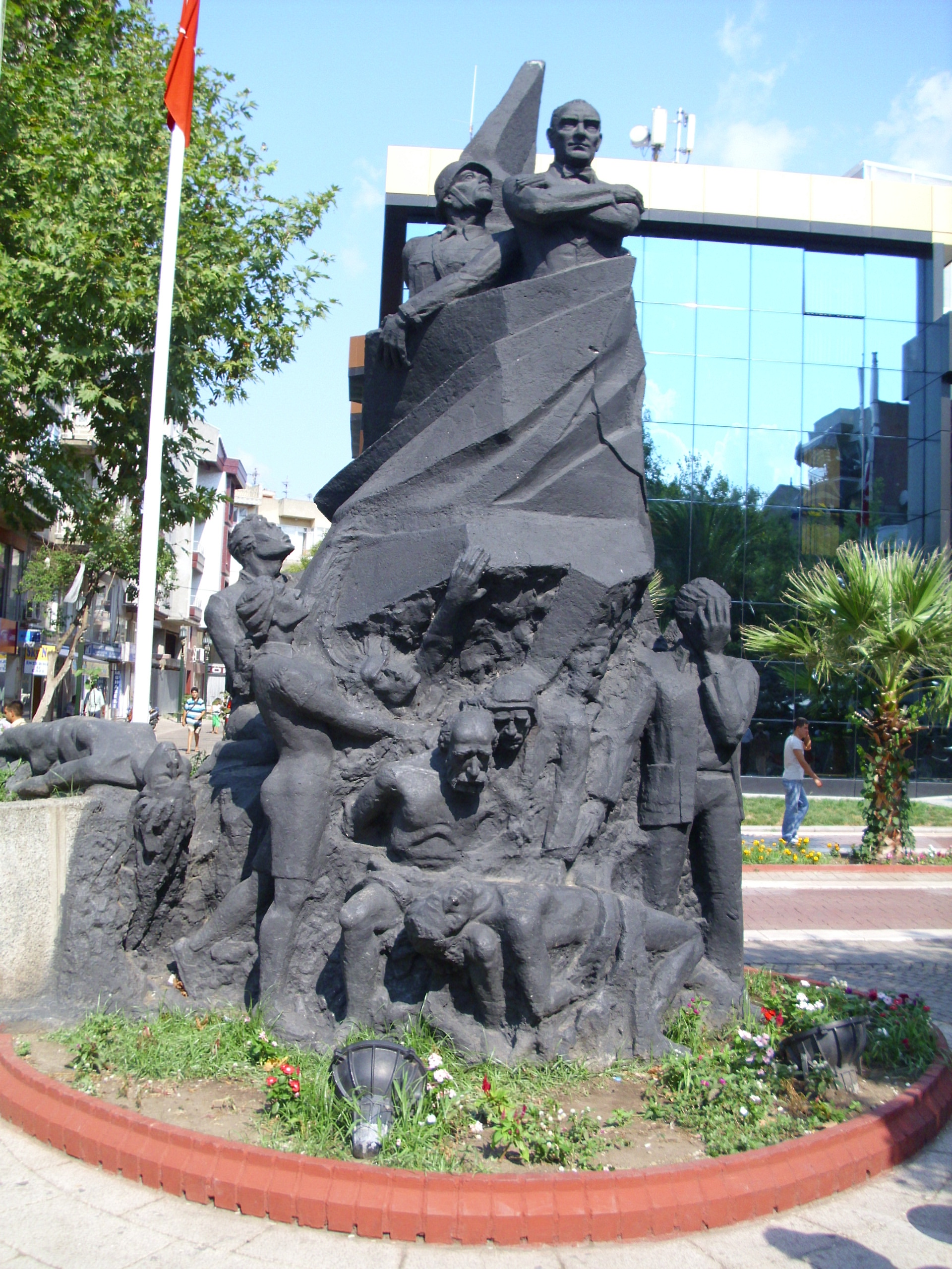 Erdek Atatürk Anıtı-Öcal